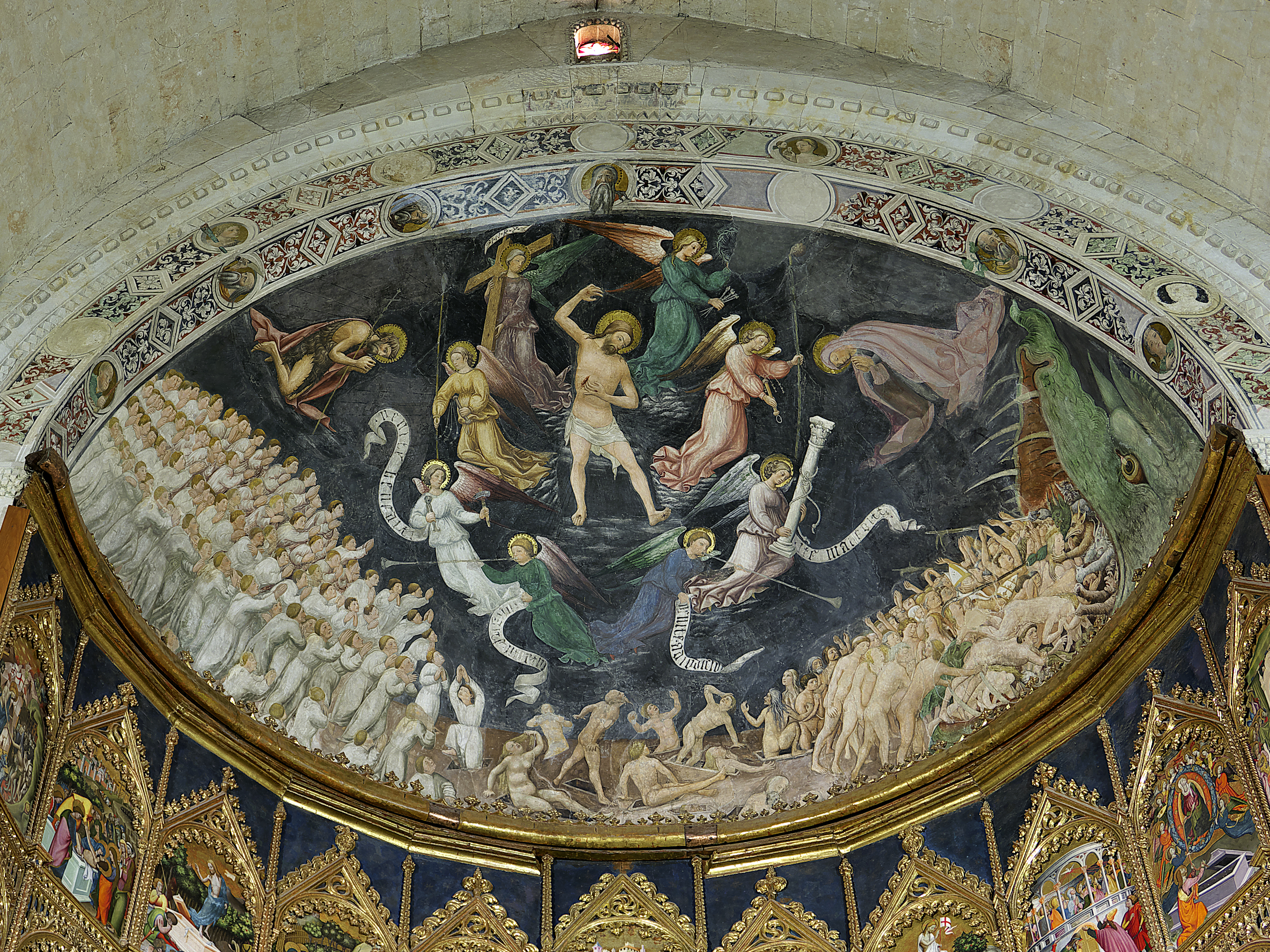 Semibóveda del ábside central de la Catedral Vieja de Salamanca. Pintura mural del Juicio Final, atribuida a Niccoló Delli (1445). Posiblemente Miguel Ángel estudió esta soberbia representación para la Capilla Sixtina.